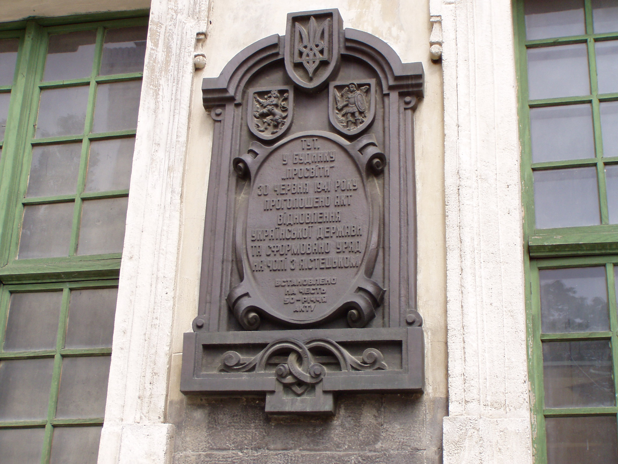 Tablica na Rynku we Lwowie upamiętniająca ogłoszenie Aktu Odrodzenia Państwa Ukraińskiego w 1941.